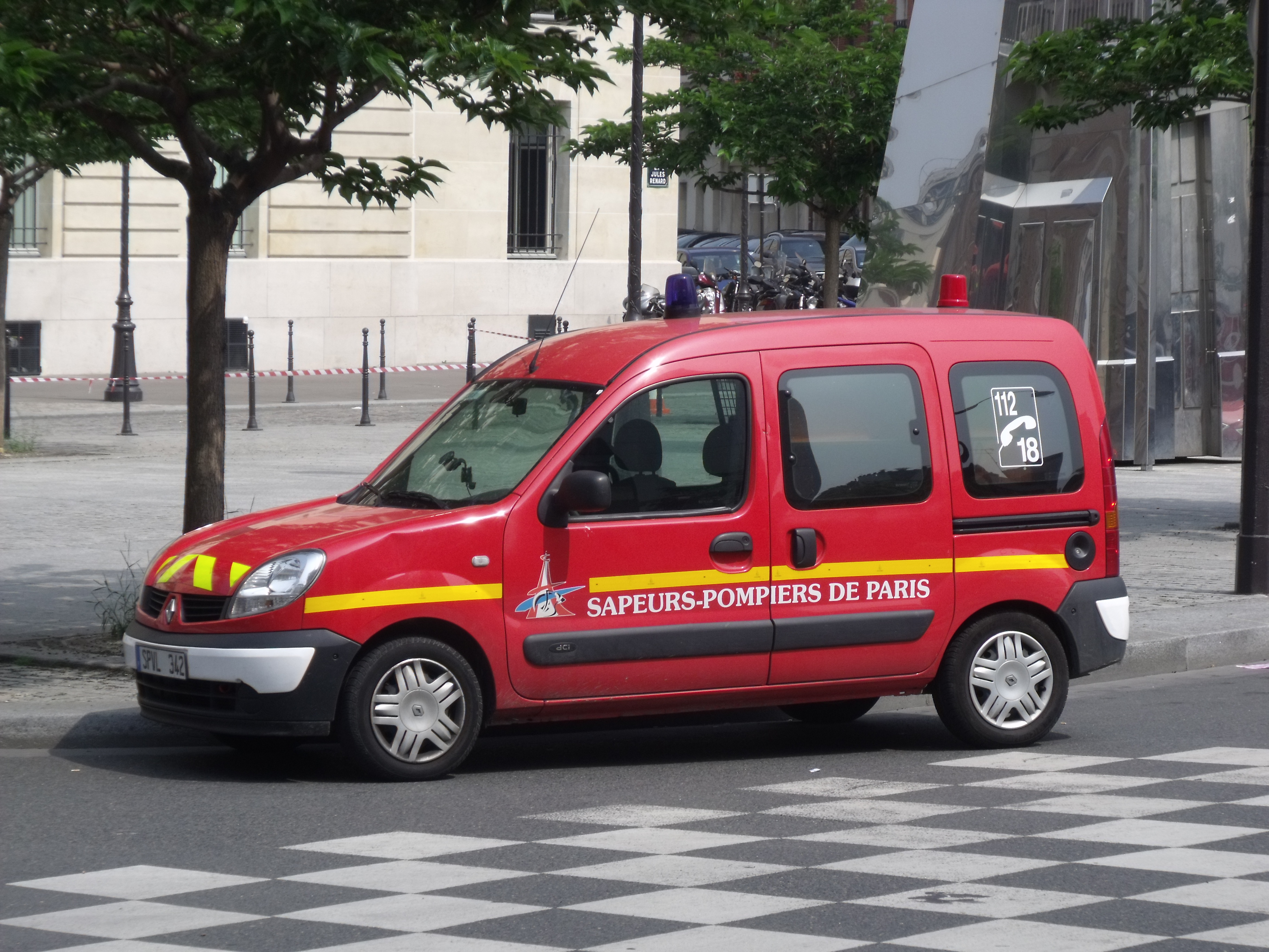 Véhicule de Liaison vu ici devant l'état major à Champerret.